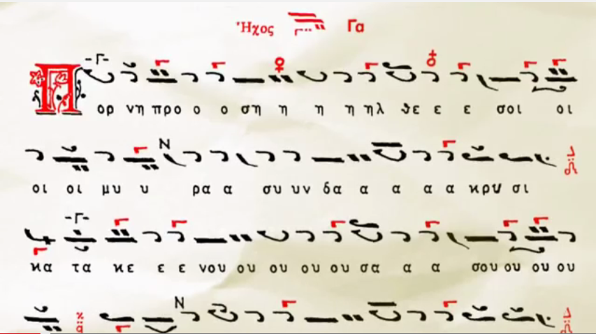 Седален на греческом, в греческой нотации 3 гласа в Великую среду по 1 кафизме. Подобен: Красоте девства: «Πόρνη προσῆλθέ σοι, μύρα σὺν δάκρυσι, κατακενοῦσά σου ποσὶ Φιλάνθρωπε,....» («Блудница приступи к Тебе, миро со слезами изливающи на нозе Твои Человеколюбче,....»)